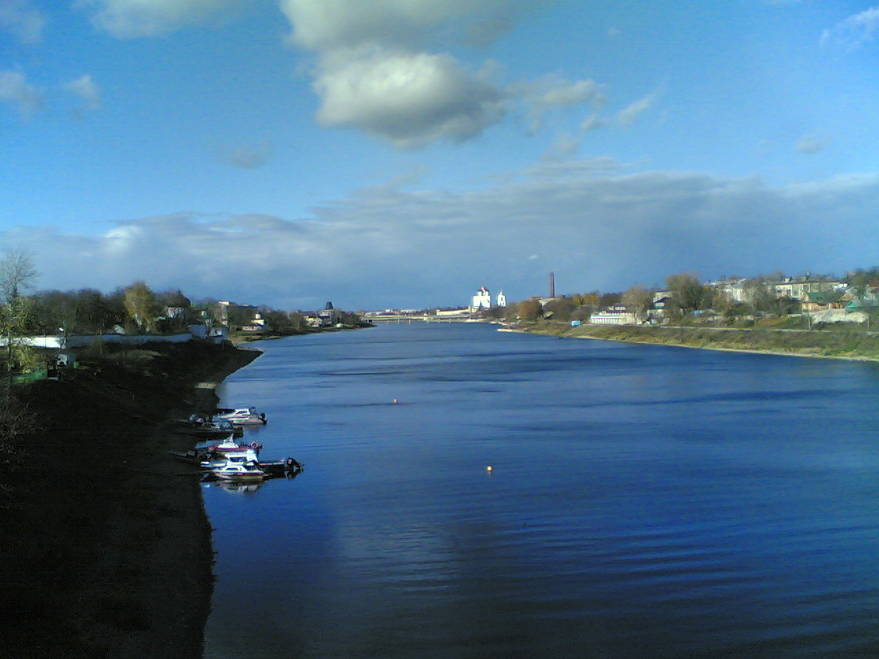 Река Великая. Вид с моста 50-летия Октября. Вдали слева - Мирожский монастырь и устье Мирожки. На дальнем плане - Псковский Кром (Кремль)